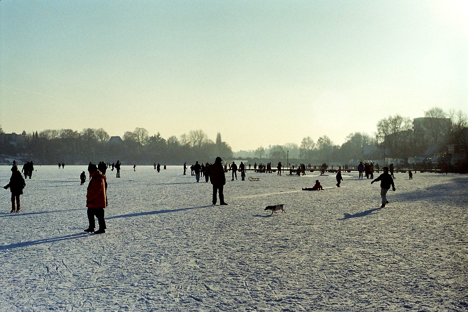 Frozen Wakenitz in January 2005